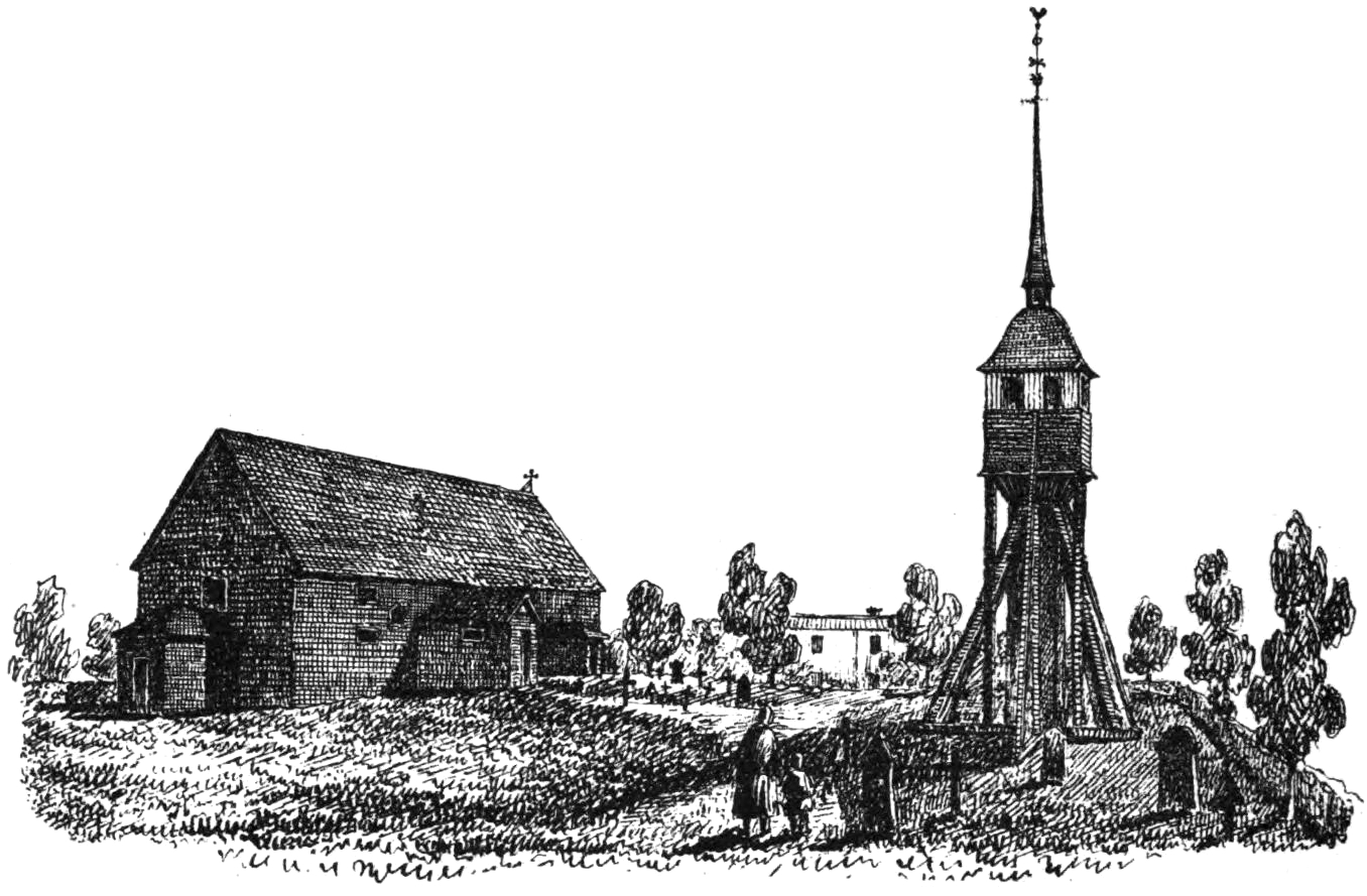 Svinhults gamla kyrka i Östergötland. Teckning i "Utdrag af Antiqvitets-Intendenten P. A. Säves afgifna berättelse för år 1861", publicerad i Antiqvarisk tidskrift för Sverige band 1, 1864.